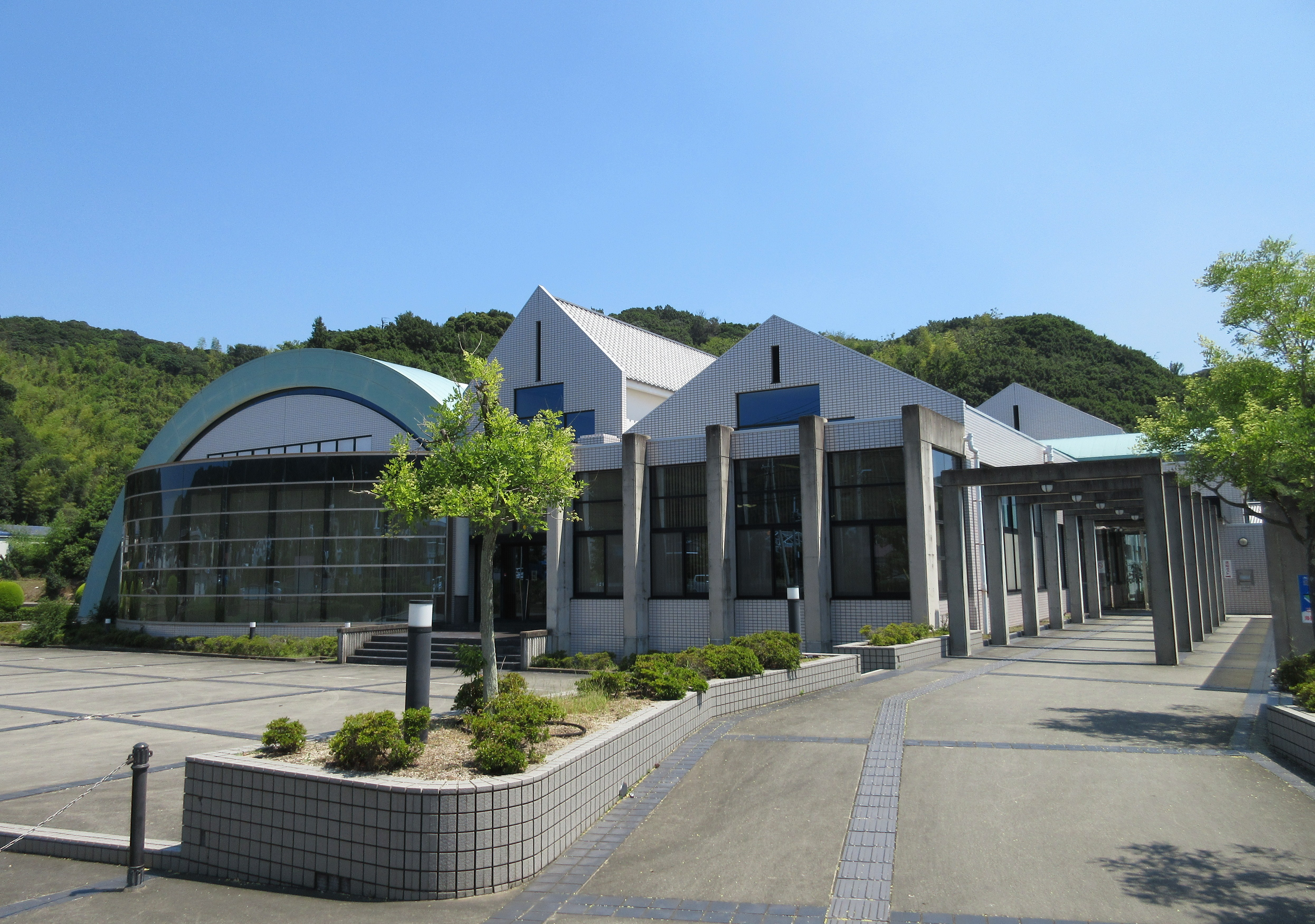 南あわじ市立図書館